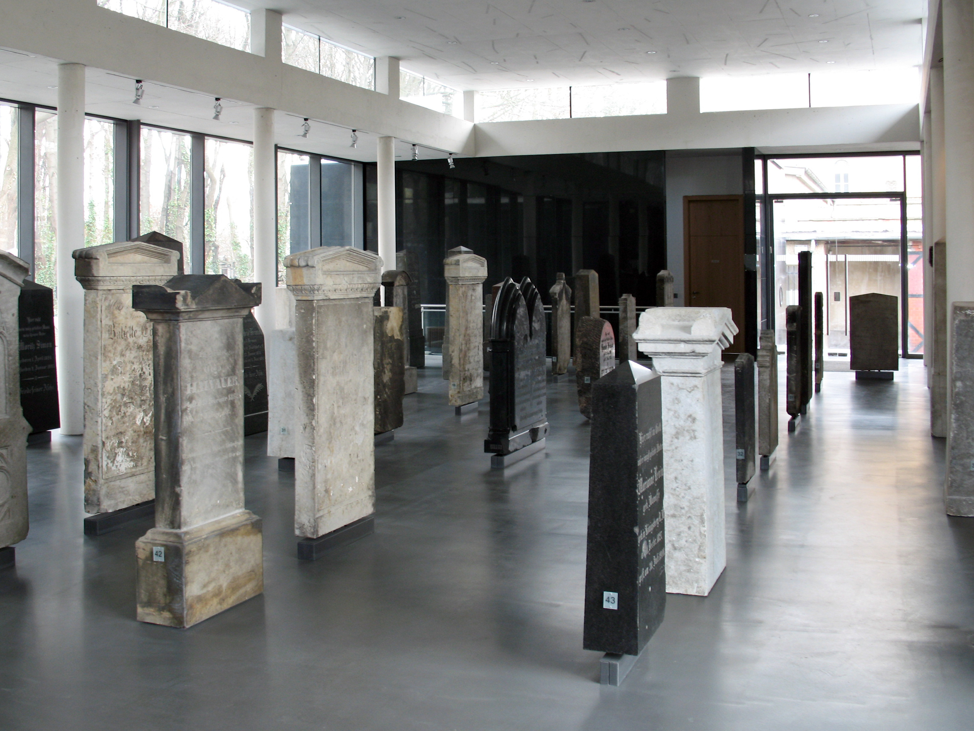 Alter Jüdischer Friedhof Schönhauser Allee, Berlin-Prenzlauer Berg. Blick ins Lapidarium.